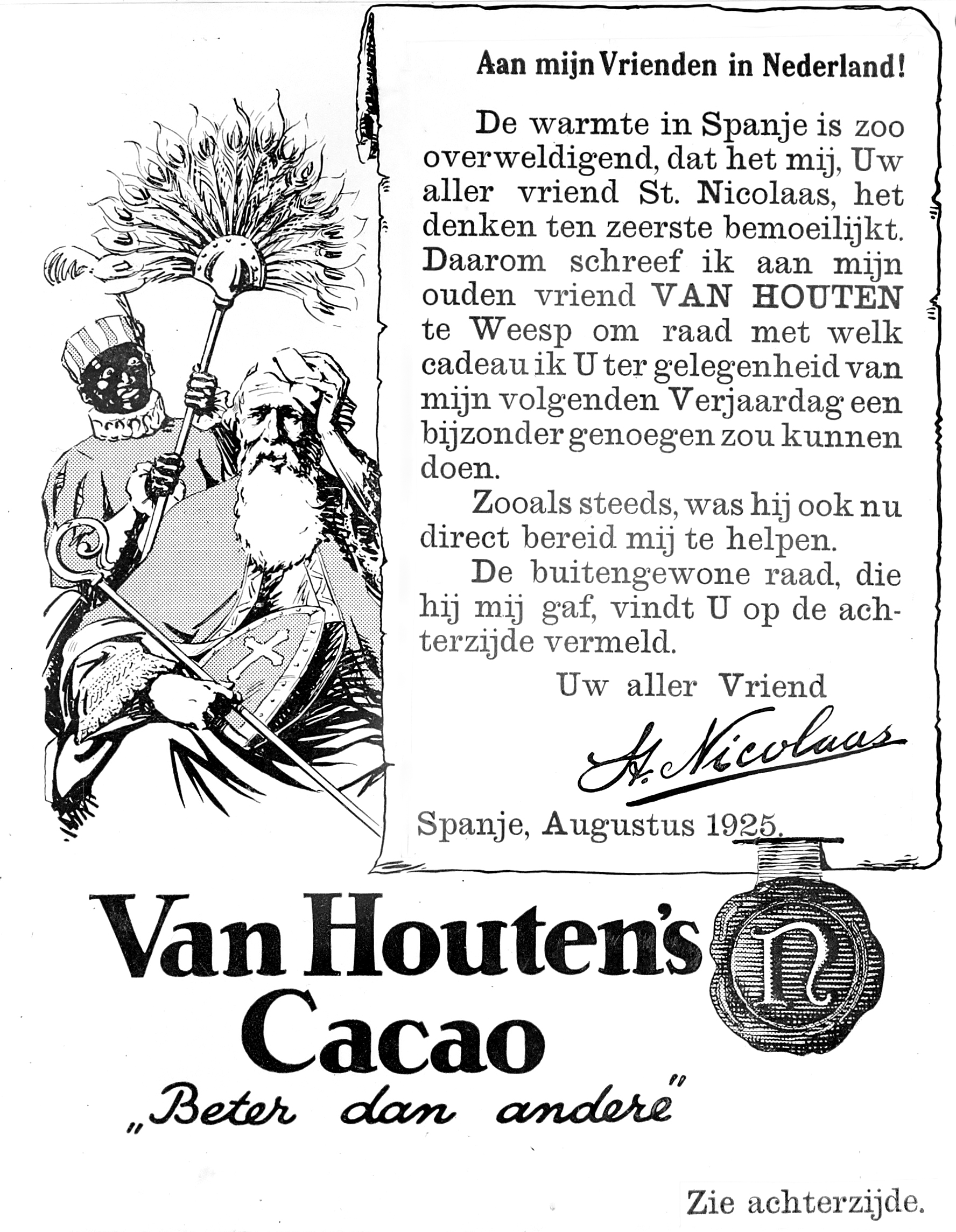 Reclame-uitingen voor Van Houten cacao en chocolade. Poster met daarop een afbeelding van Sint Nicolaas en Zwarte Piet en een mededeling van St. Nicolaas omtrent het volgende verjaardagsgeschenk augustus 1925